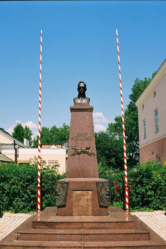 Autorem zdjęcia jest Przemysław Niepokój-Hepnar